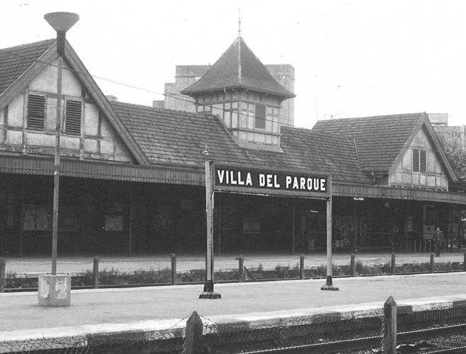 Vista del edificio principal